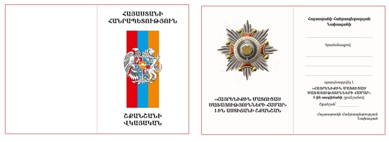 «Հայրենիքին մատուցած ծառայությունների համար» 1-ին աստիճանի շքանշանի վկայական